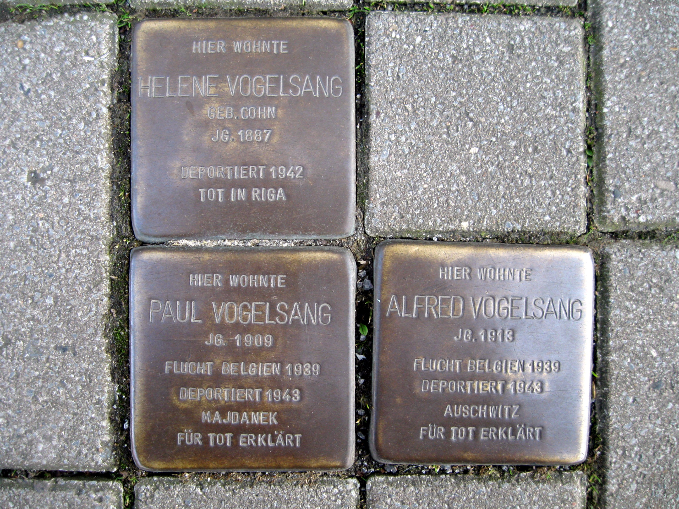 Stolpersteine in Dortmund, Asselner Hellweg 99